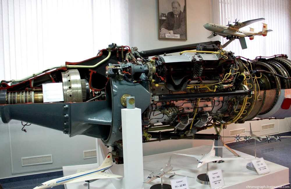 Двигатель НК-12МВ, АО "Кузнецов", Самара, Россия